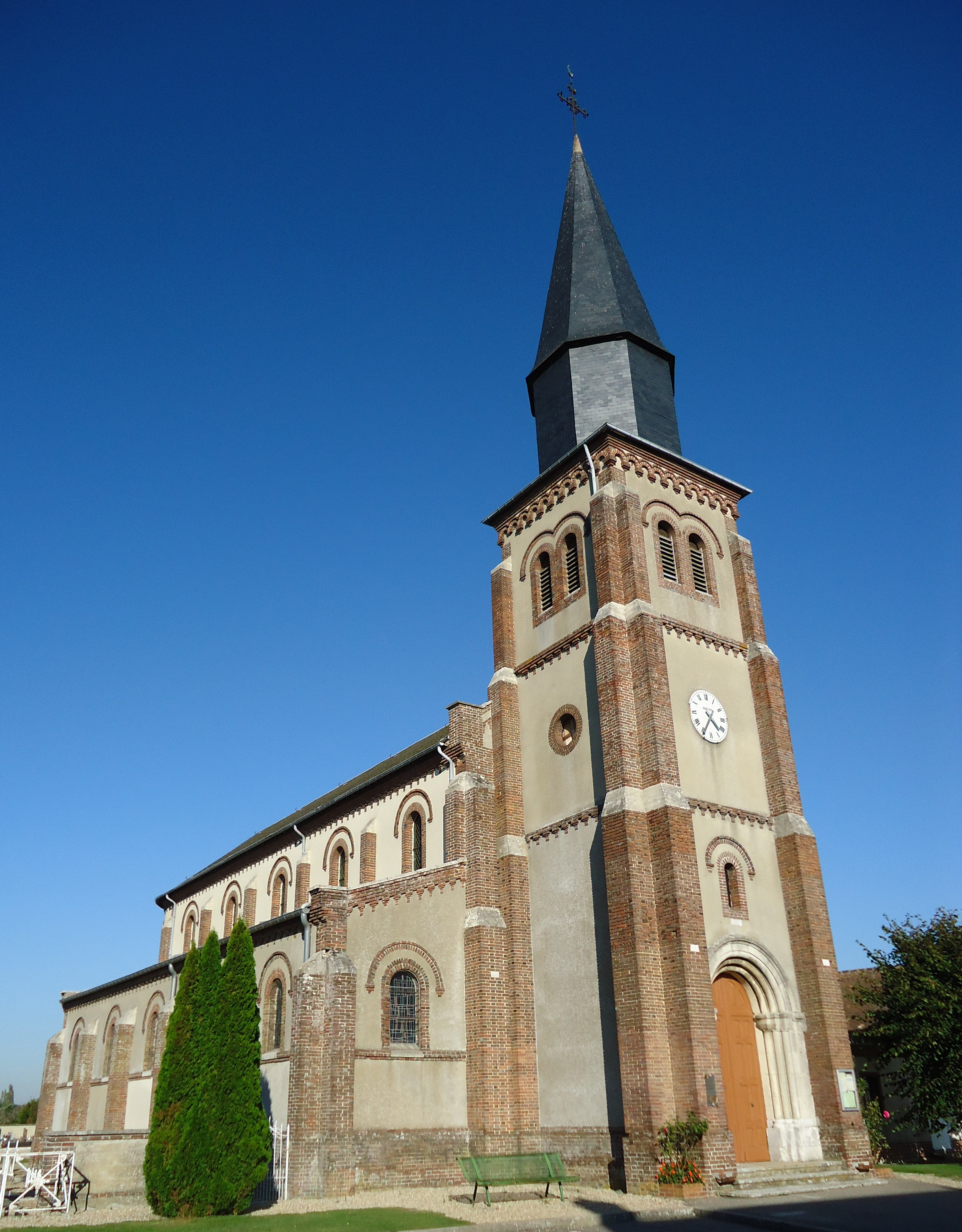 Eglise Saint -Pierre de Huest, rue de Vernon